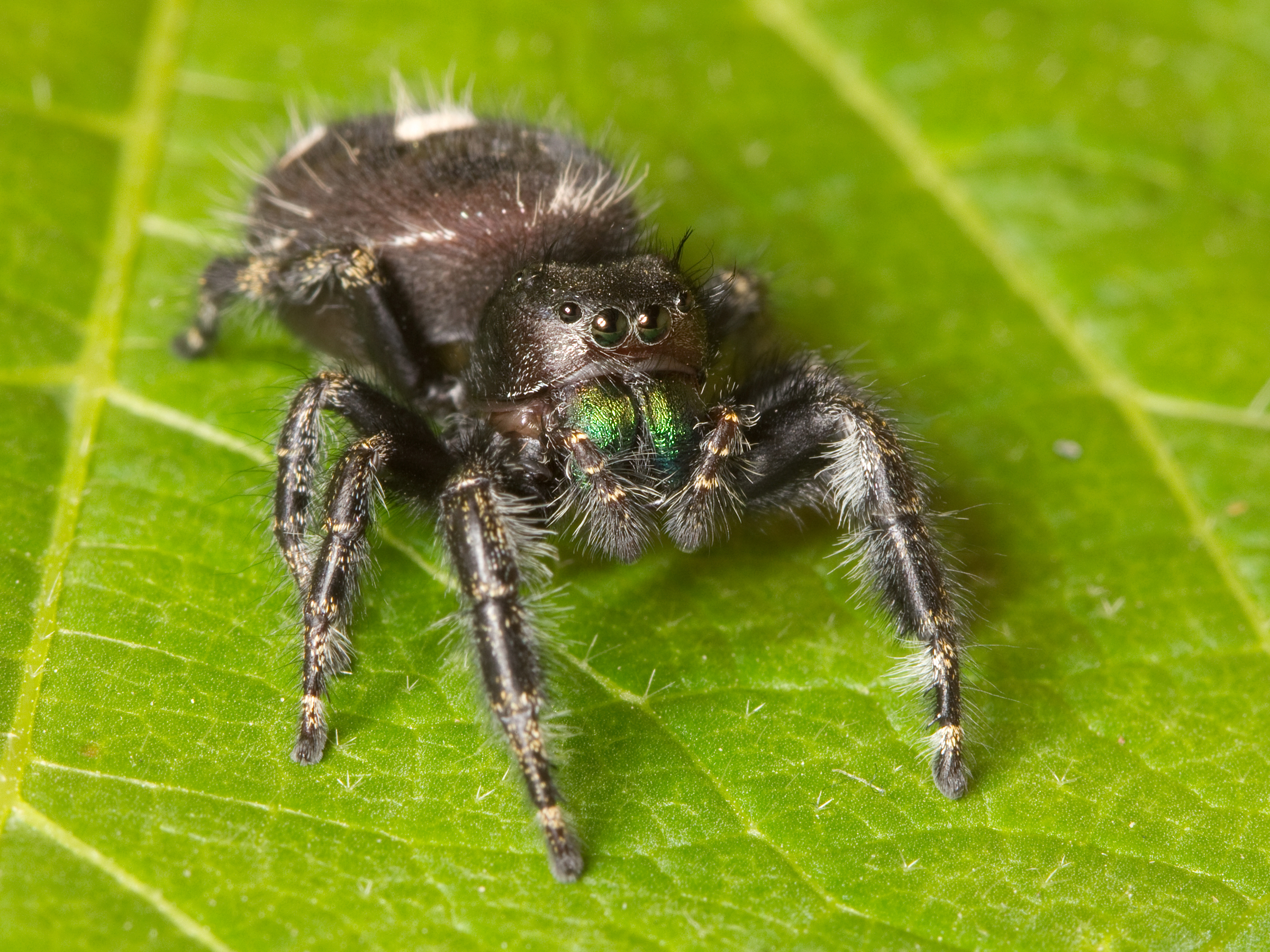 Adult female Phidippus audax jumping spider in Nashville, Tennessee